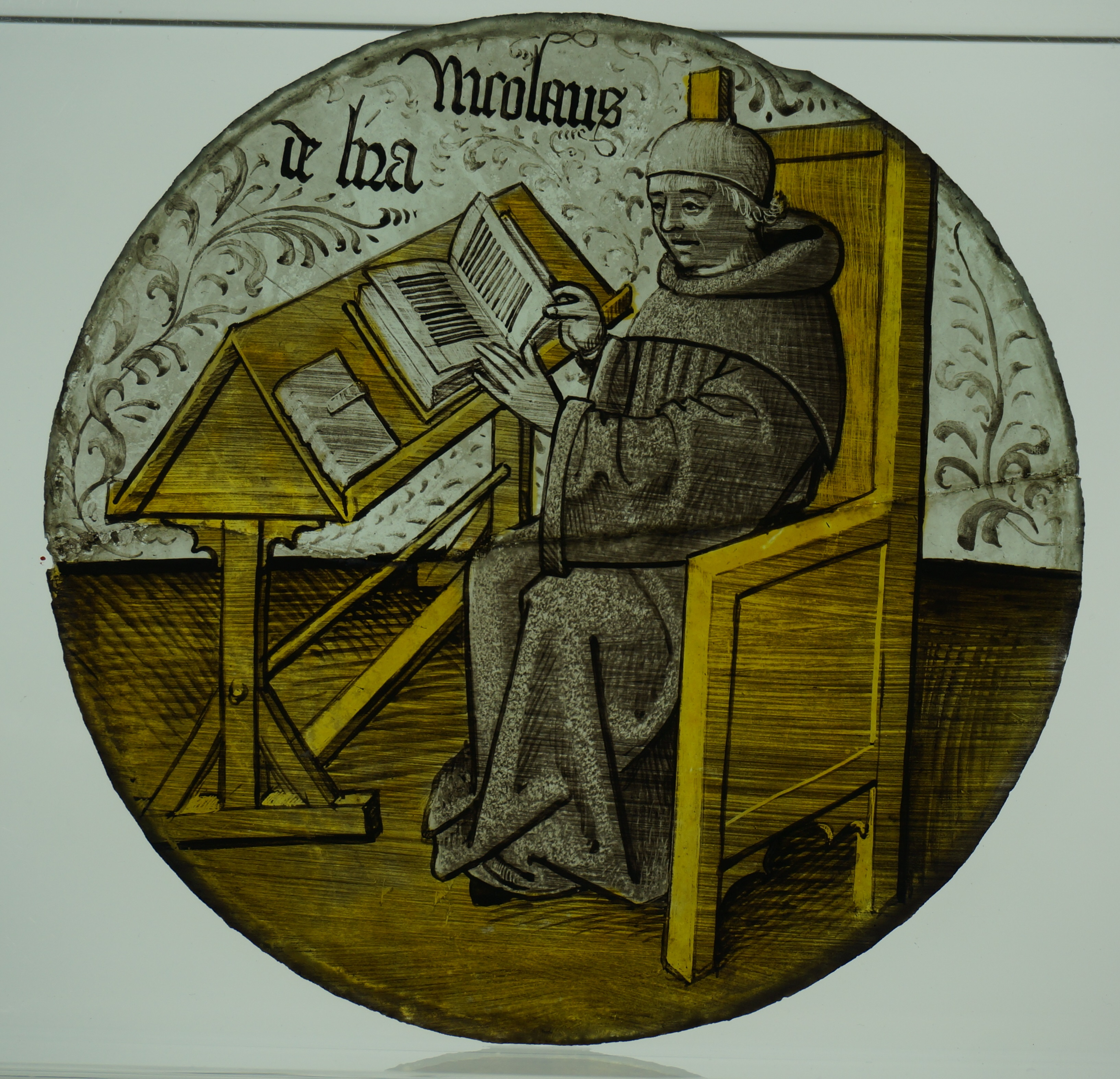 Vitraill de Claude et Henryet Piqueret présenté à la "cité du vitrail". Il provient de la bibliothèque du chapitre cathédrale de Troyes.